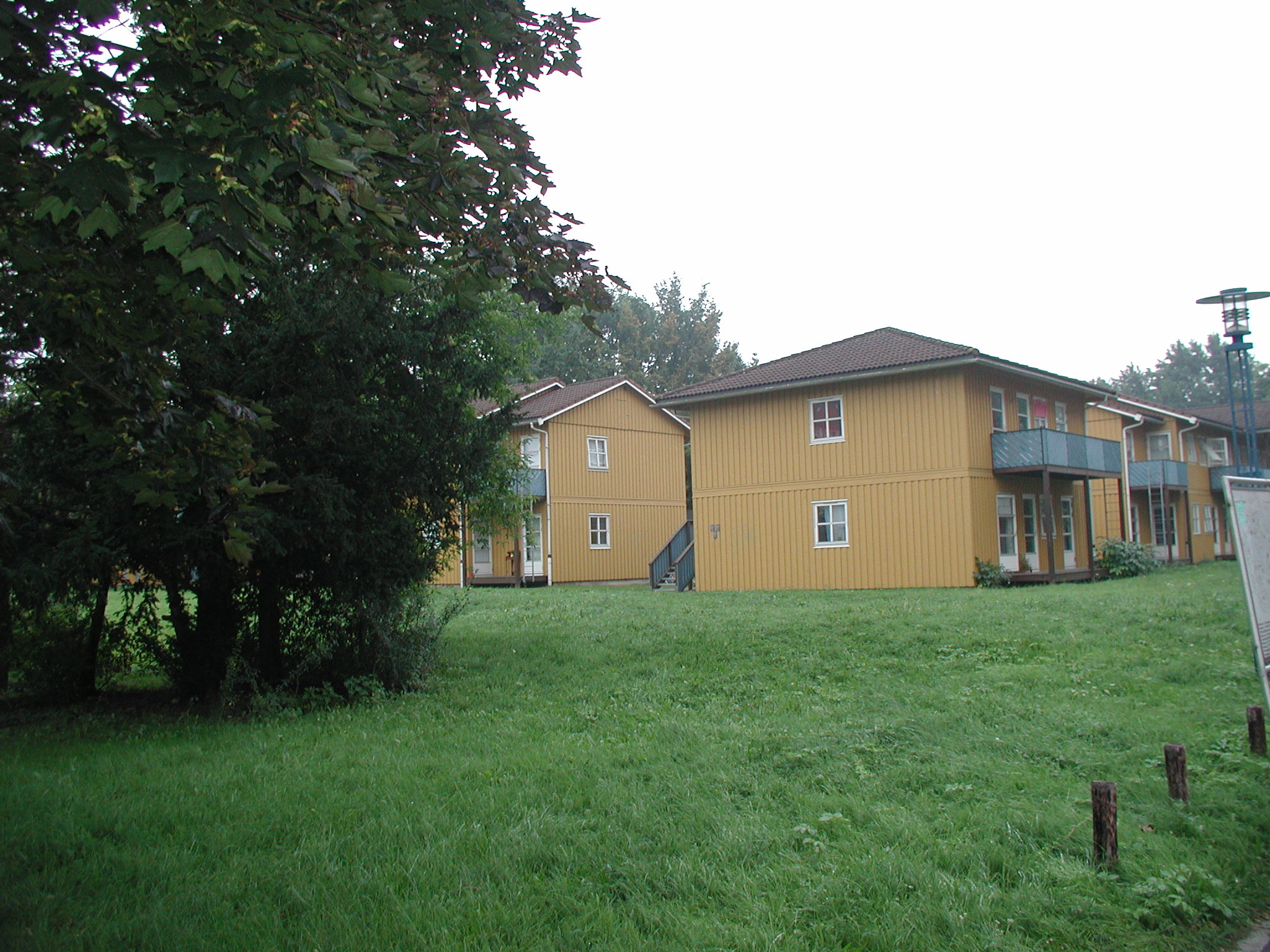 Hürth Efferen - Studentendorf